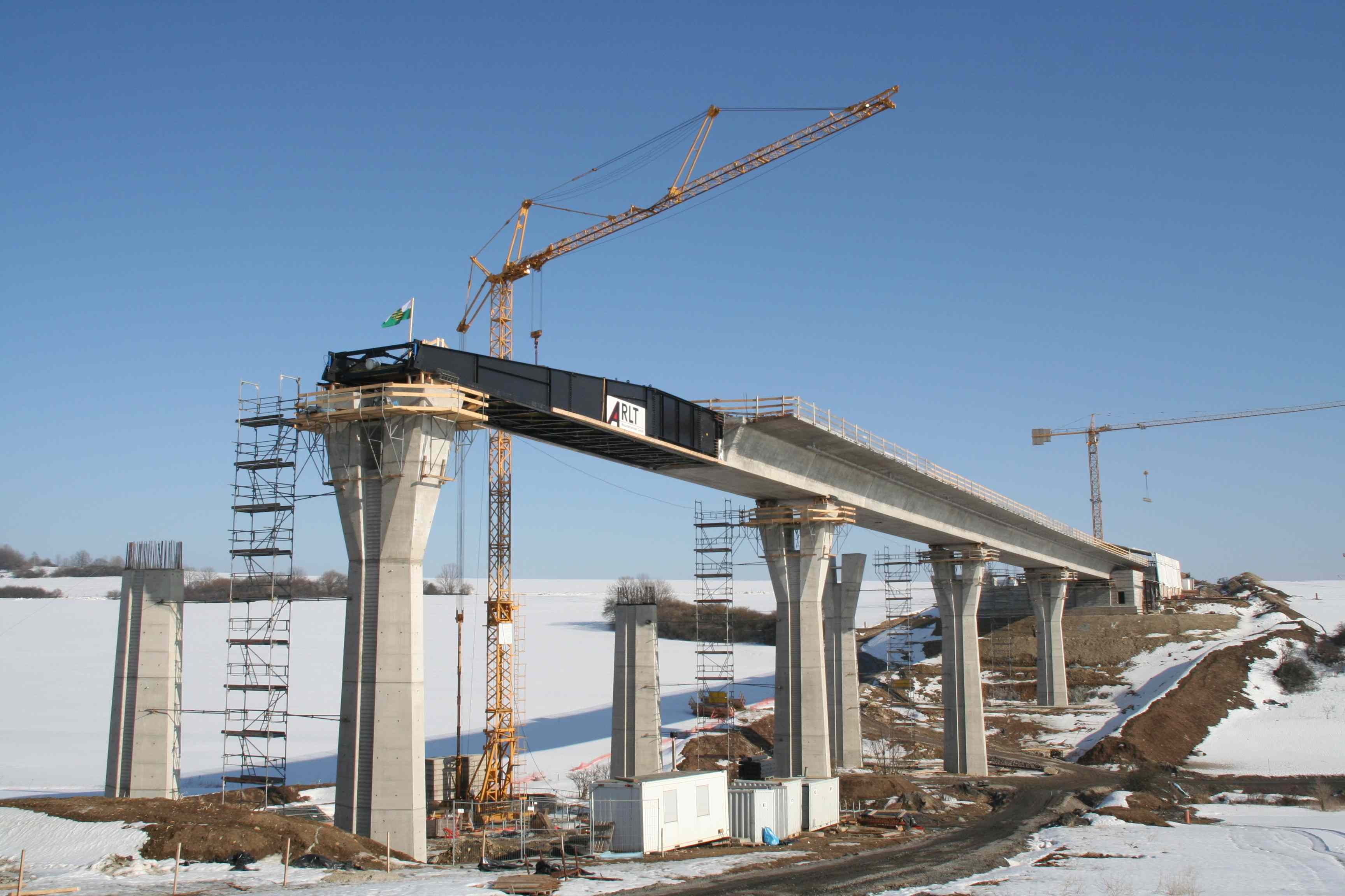 Talbrücke Sulzebach Bundesautobahn A73 bei EisfeldTaktschiebebrücke